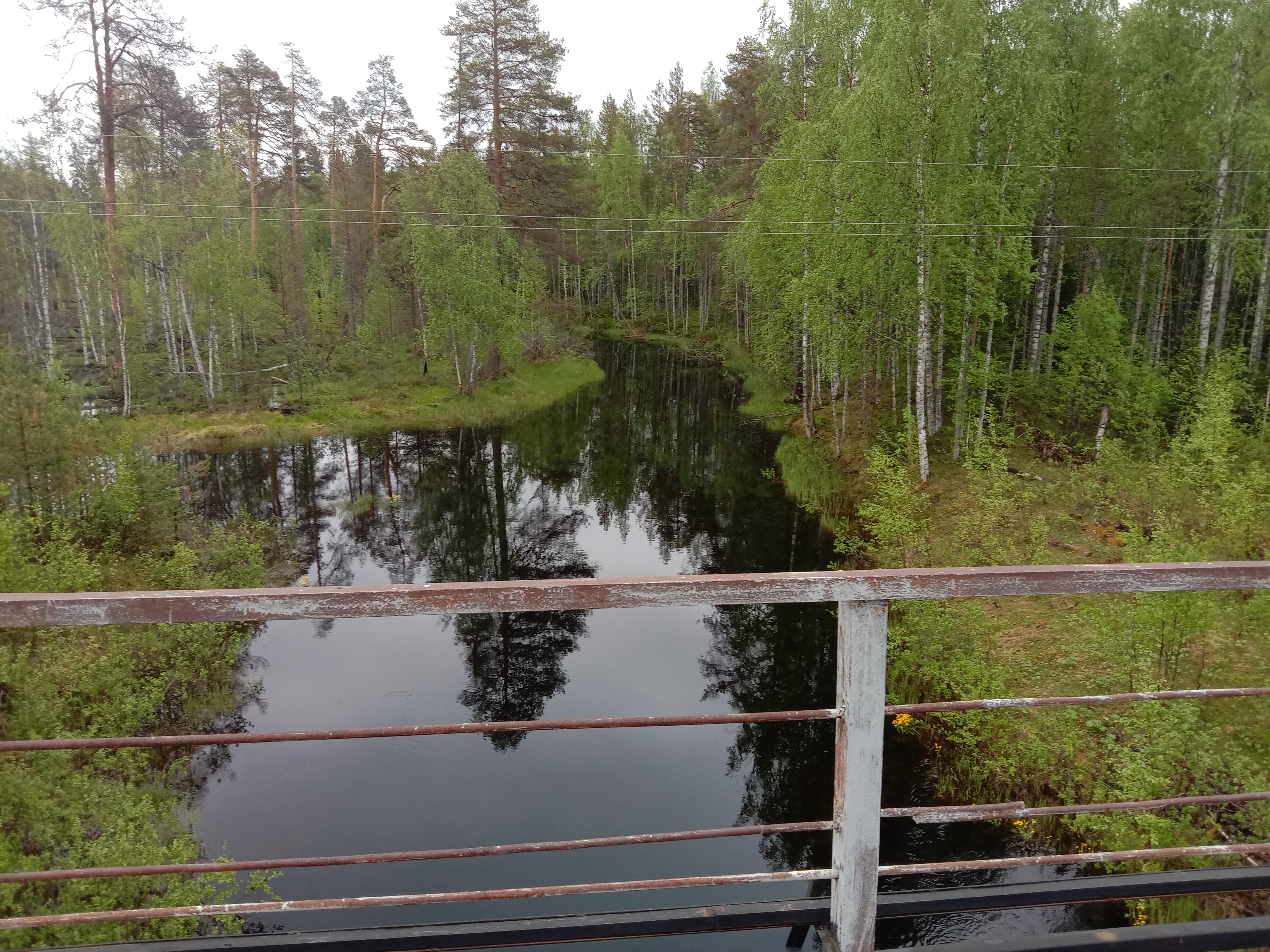 Река Бола